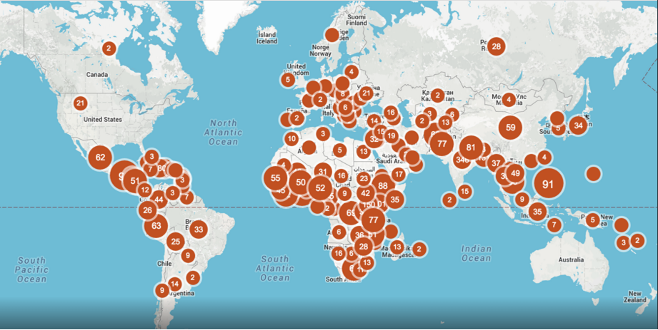 Монгол: CartoMap